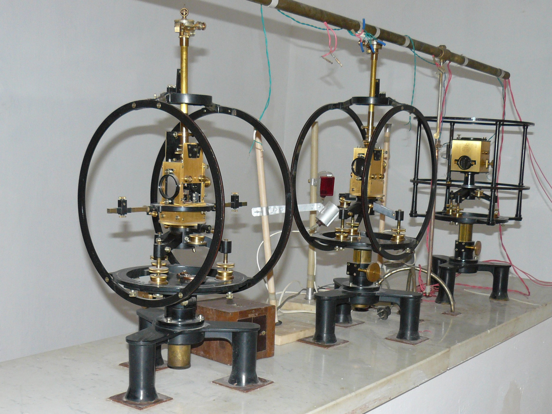 Surlari Geomagnetic Observatory, Askania variometers (1943).